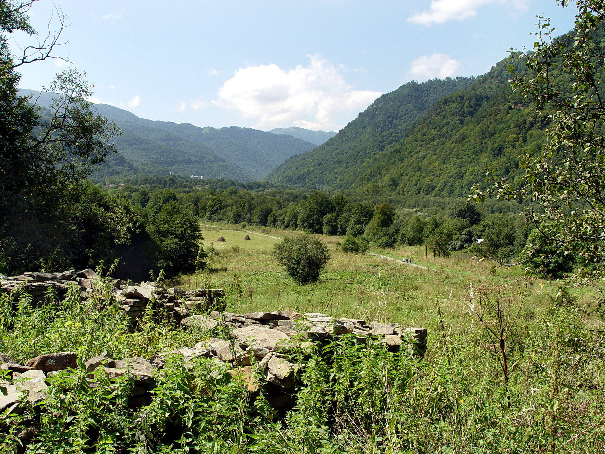 Архызский_заповедник_-_обзорный_вид